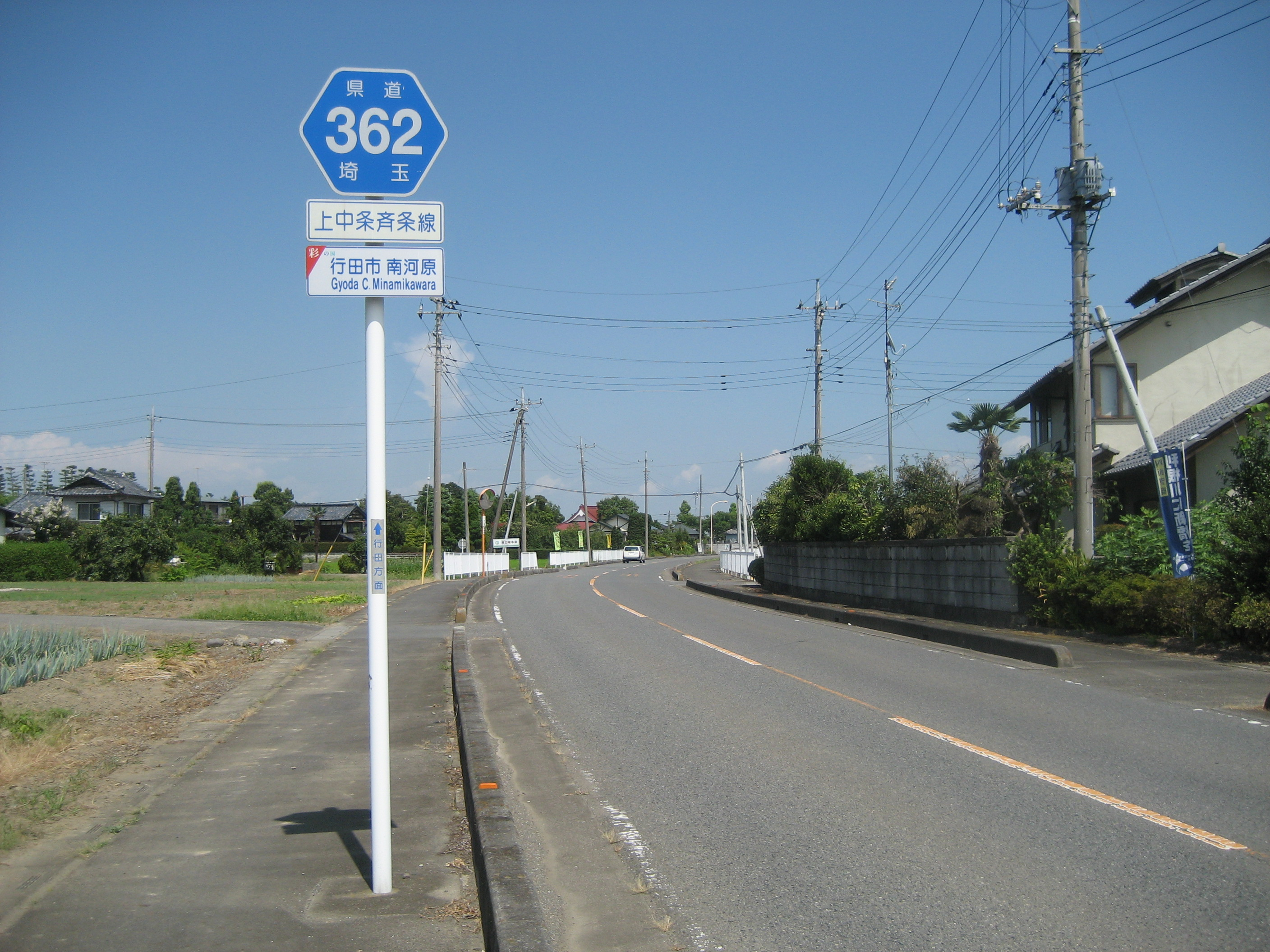 埼玉県道362号線行田市南河原